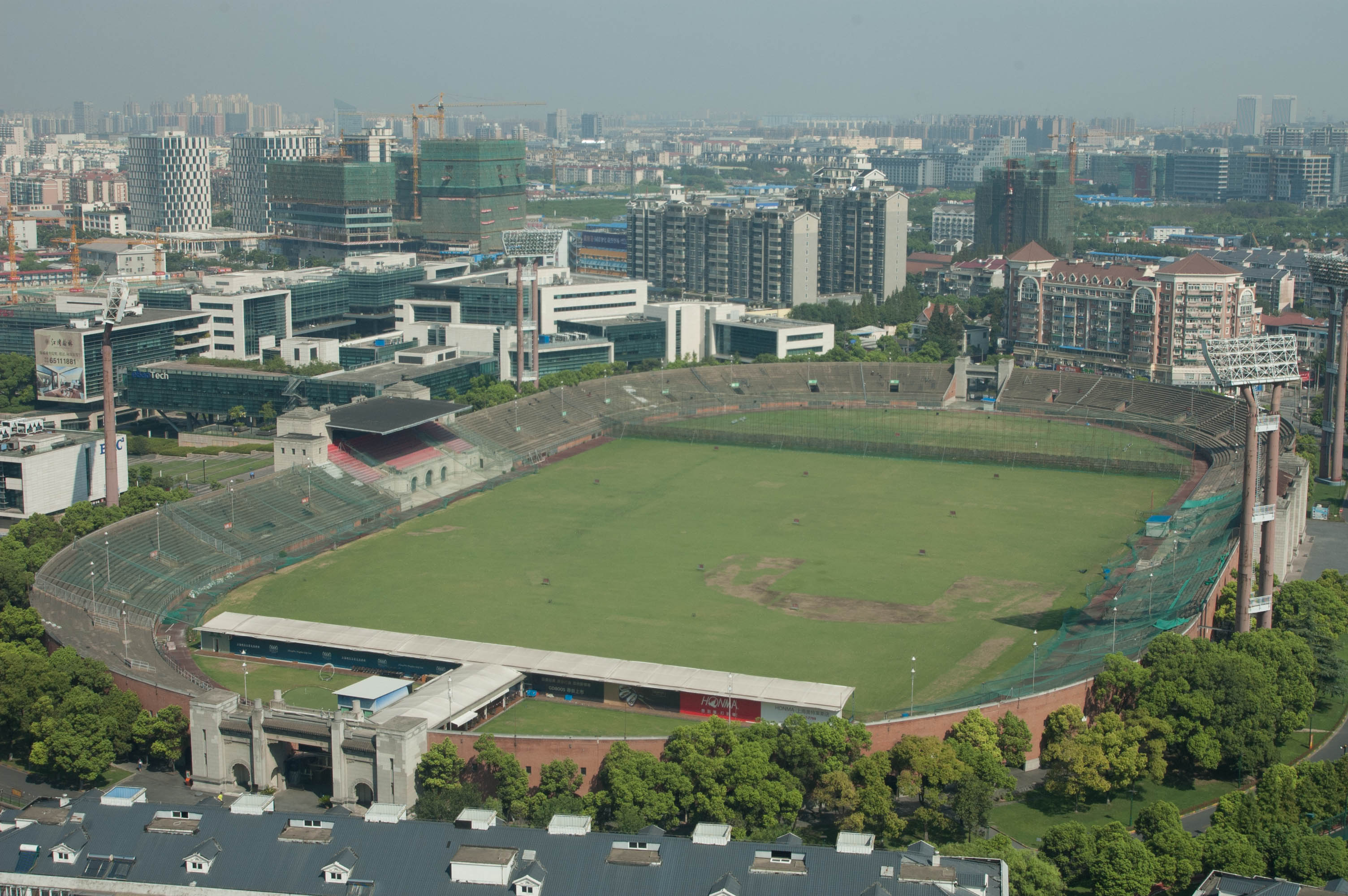 上海江湾体育场全貌